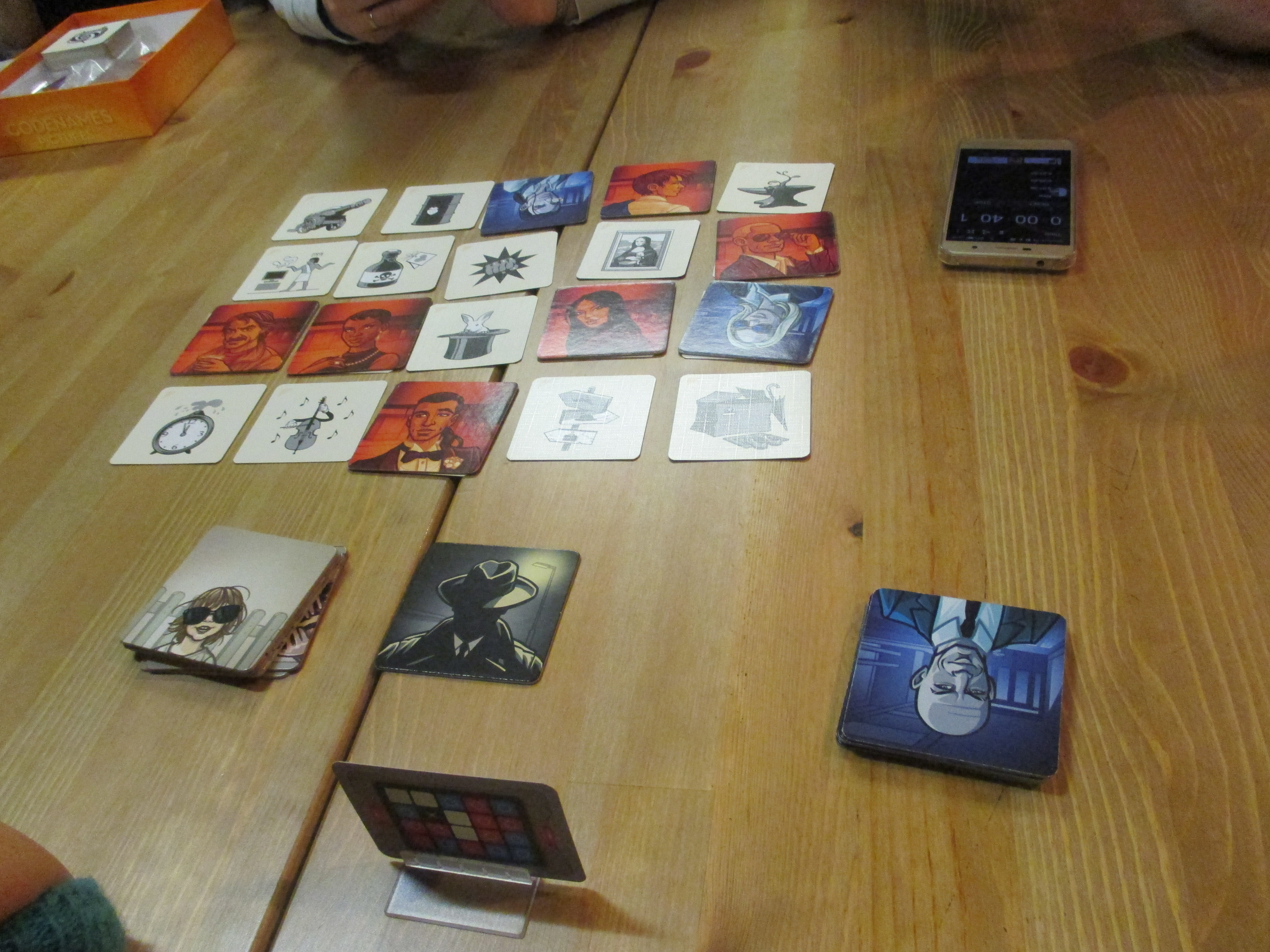 Codenames: Pictures társasjáték játék közben egy budapesti társasjáték-klubban